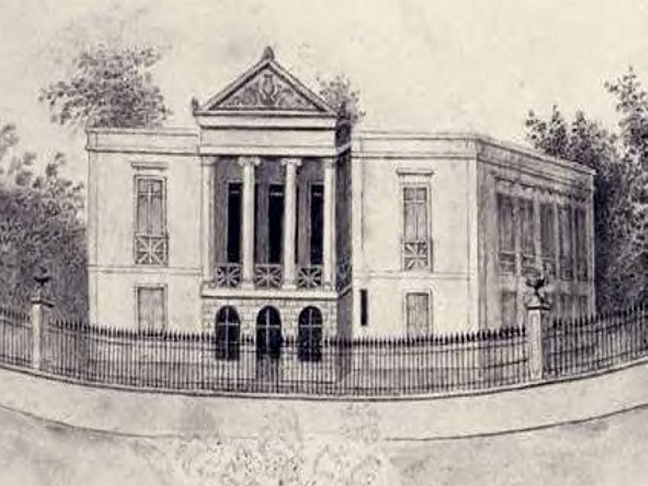 Villa Stoltz in Paris 1861 [N.B. Diese Villa wurde lt wp:fr im Jahr 1861 in Le Vésinet von dem Architekten Pierre-Joseph Olive erbaut] Fotograf/Zeichner: unbekannt Datum: 08.07.2006